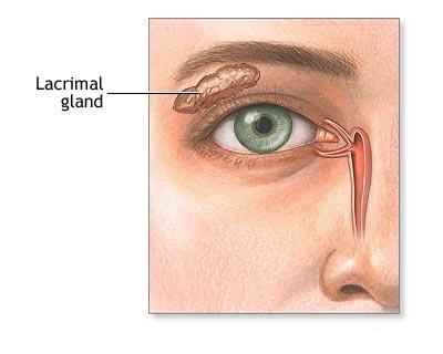 Glande lacrymale